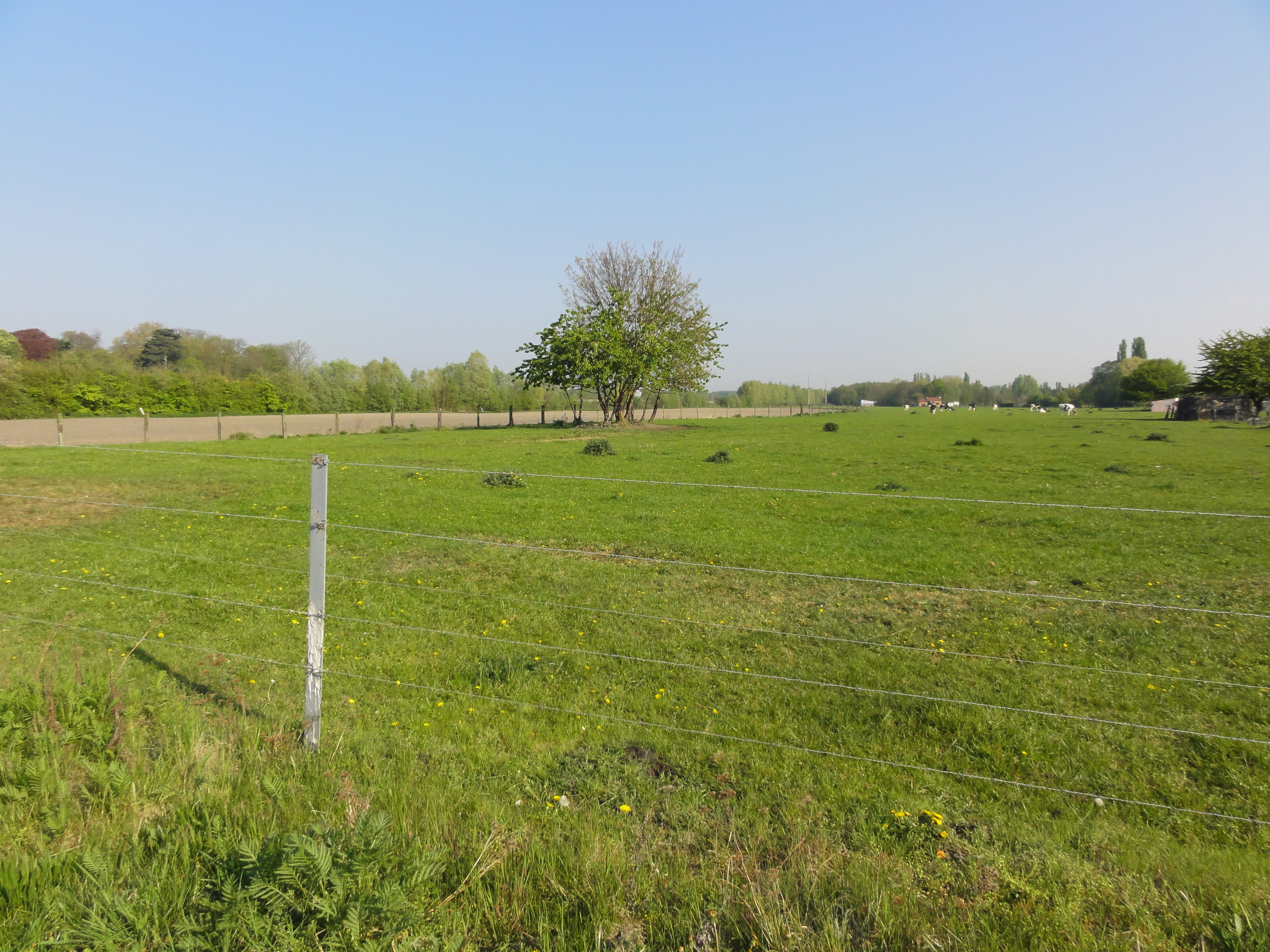 Terril n° 255 dit Cavalier Route de Bruille, Fosse De Sessevalle de la Compagnie des mines d'Aniche, Somain, Nord, Nord-Pas-de-Calais, France.